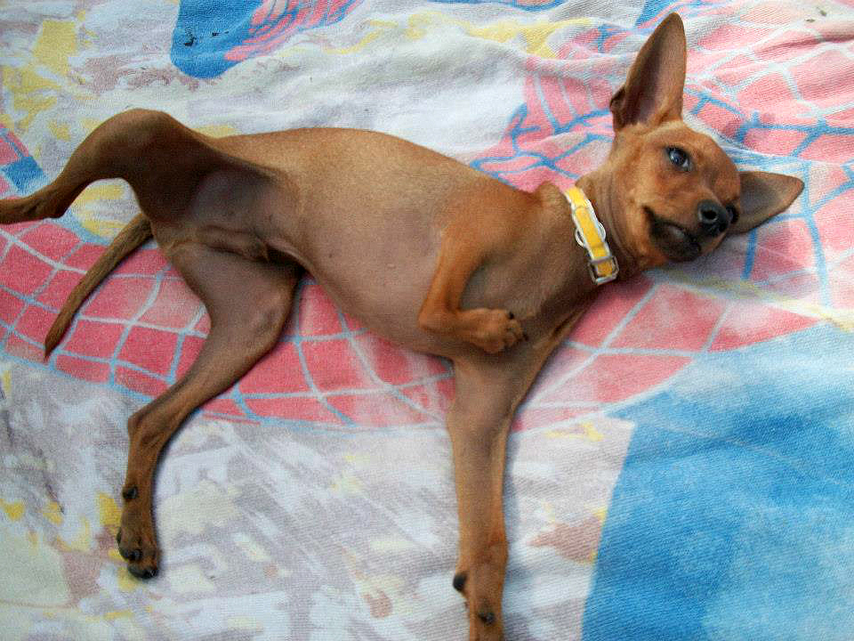 Perro chihuahua de tres patas normales.